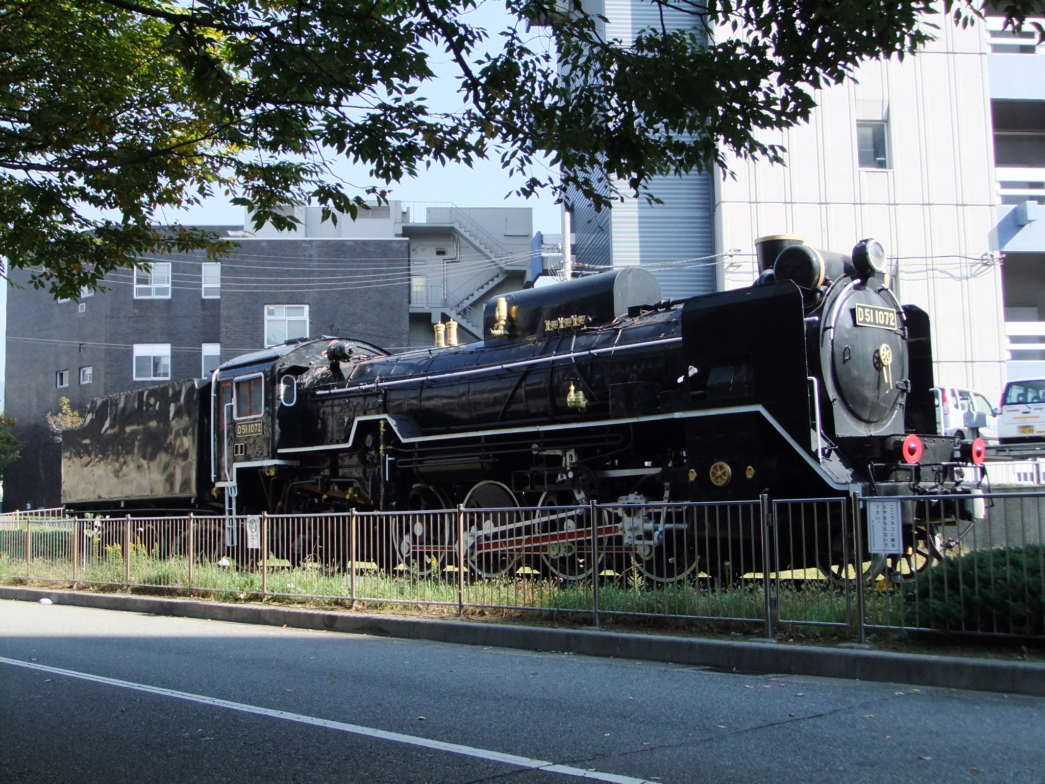 D51 1072号機 神戸駅南に保存